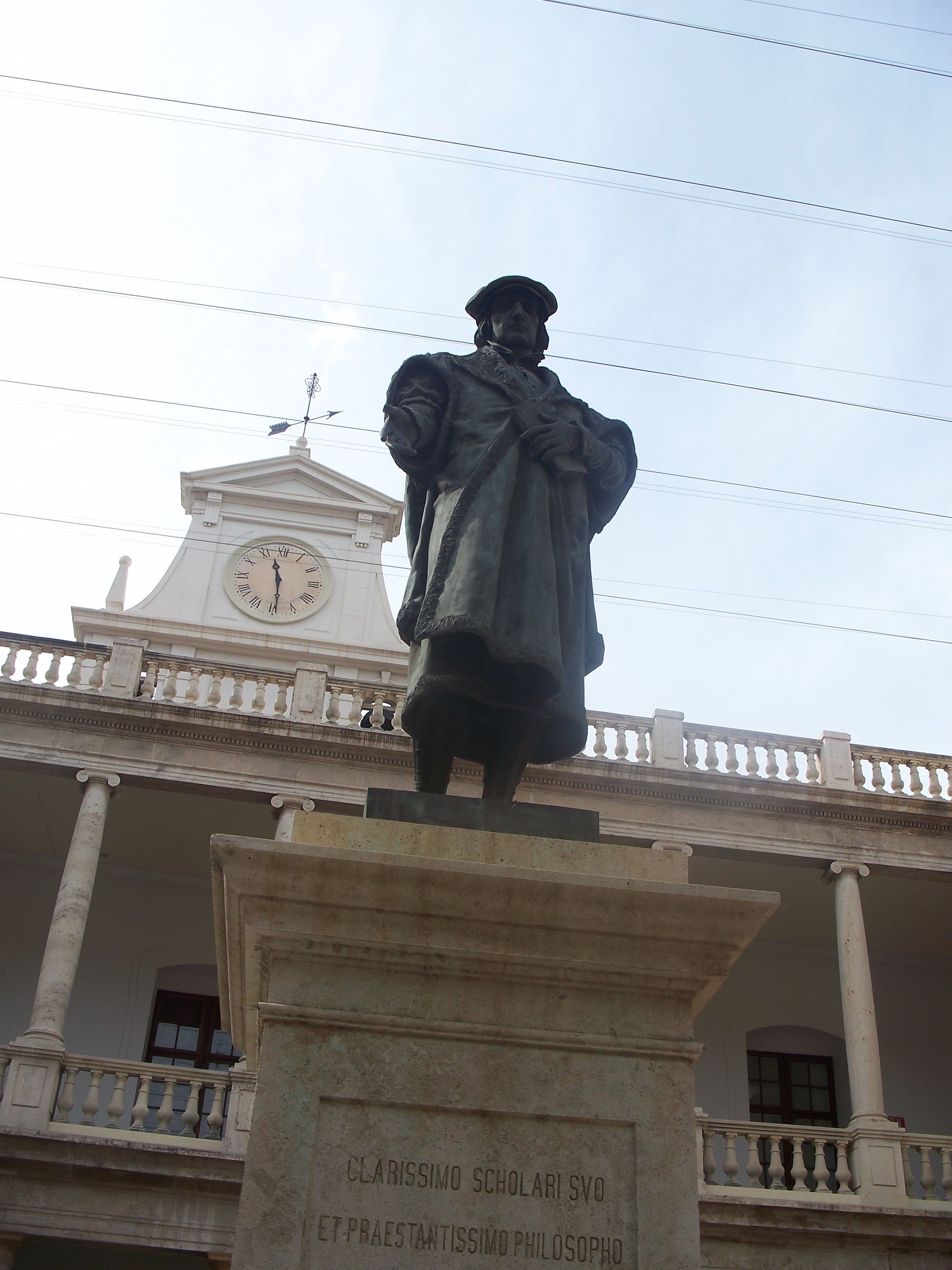 Lluís_Vives_a_la_Universitat_de_València